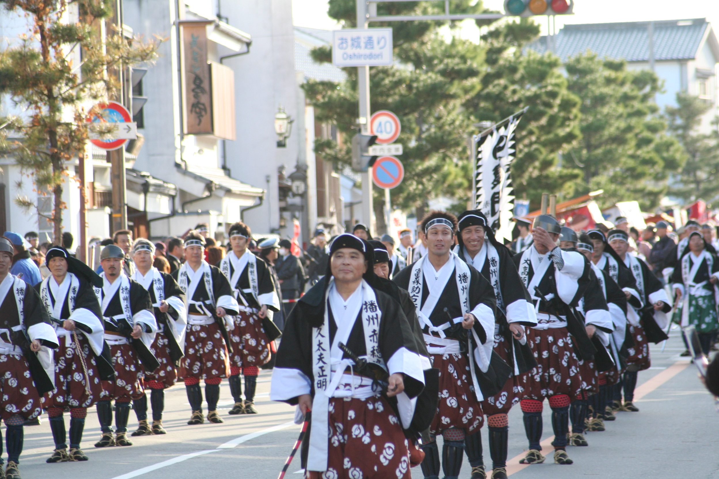 赤穂義士際。2009年12月14日に兵庫県赤穂市にて行われた祭りの様子。